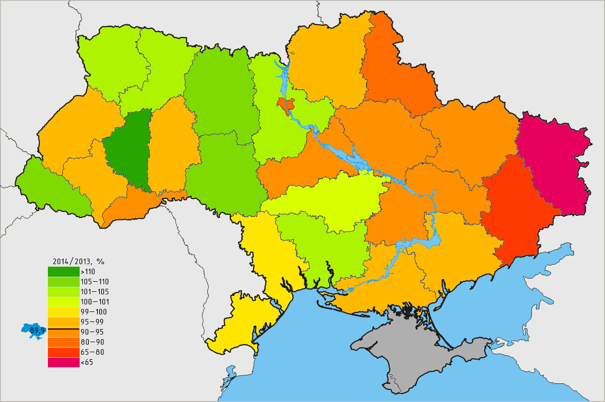 индексы промышленного производства по регионам Украины 2014 относительно 2013